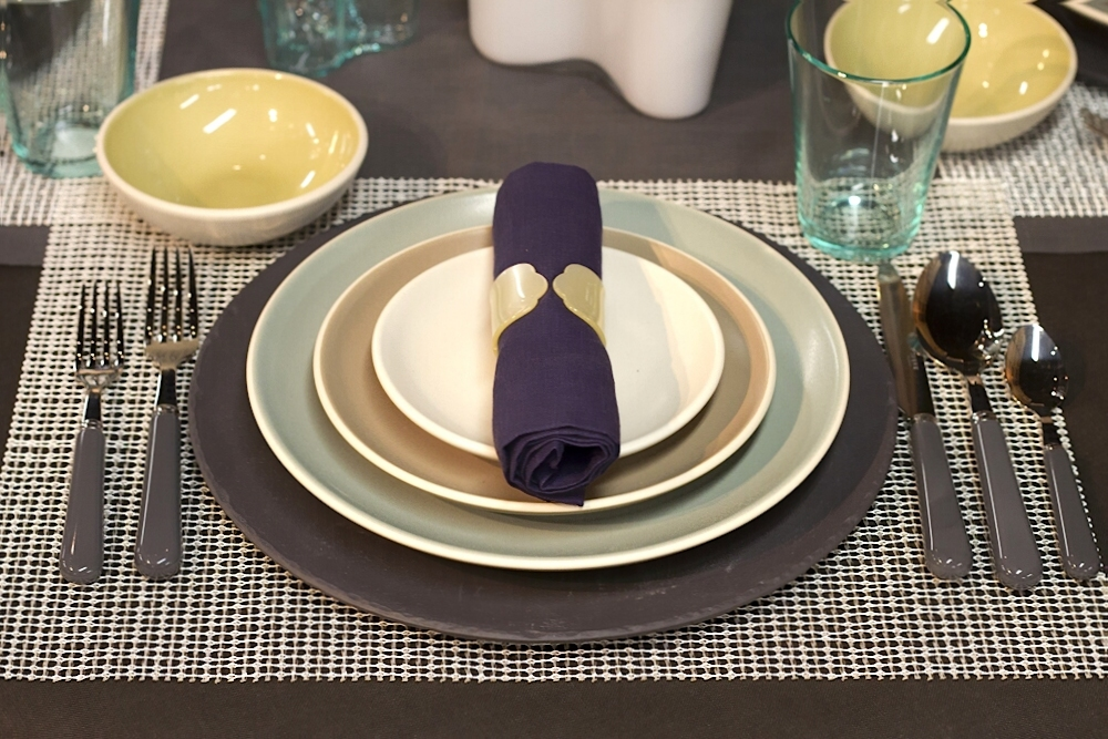 Tischgedeck für ein mehrgängiges Menü, hier u. a. mit Tischset, Platzteller, Serviette mit Serviettenring, Trinkglas